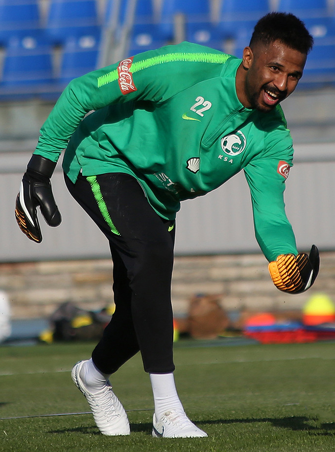 Сборная Саудовской Аравии потренировалась в Петербурге